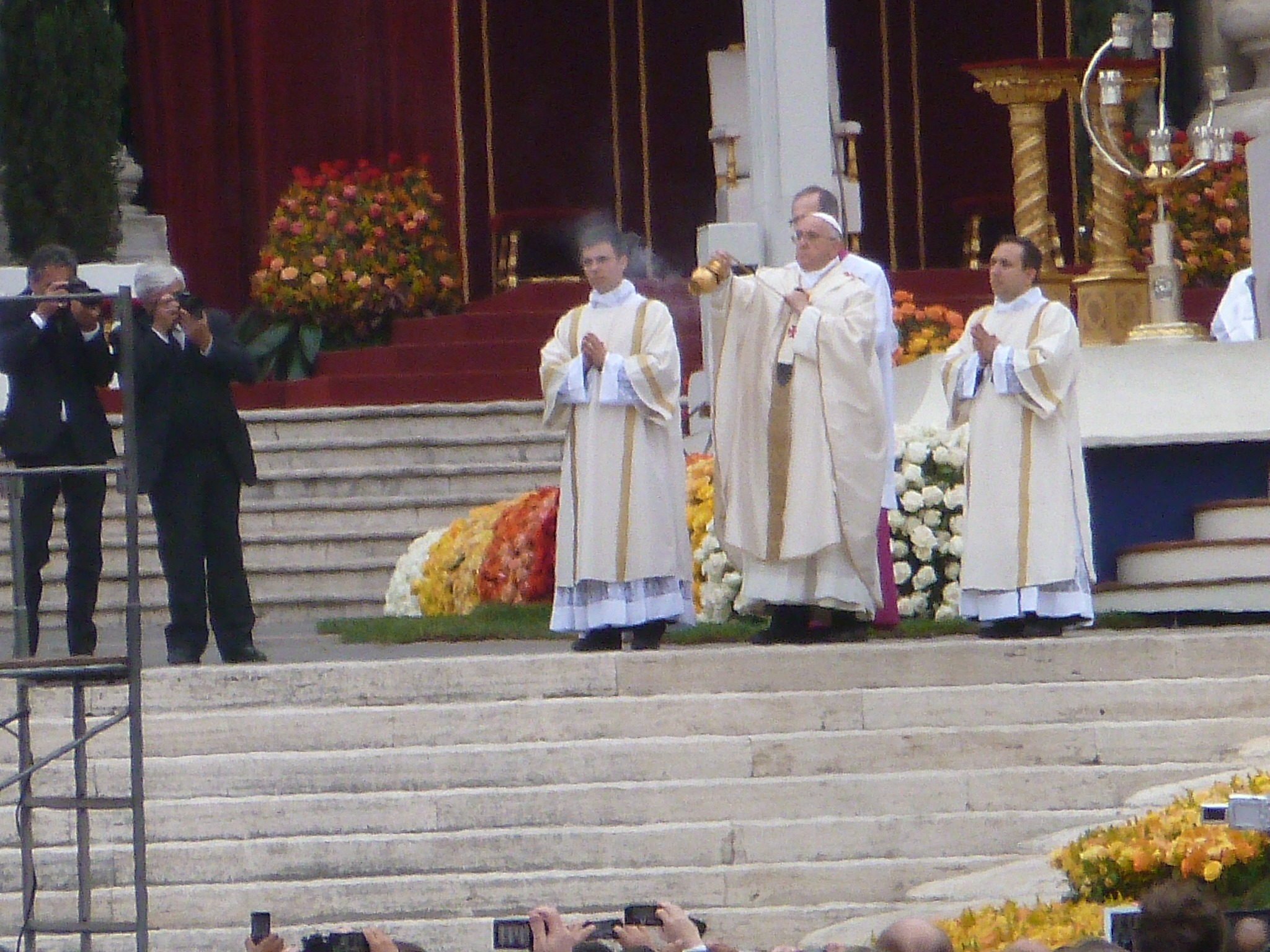 Pape François lors de l’encensement, messe de canonisation de Jean-Paul II et Jean XXIII.